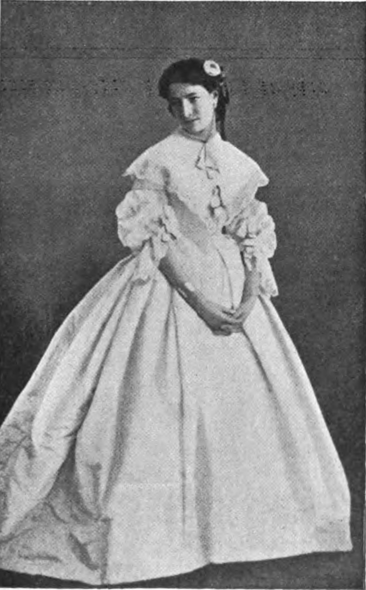 Illustration du livre Ma double vie. Mémoires de Sarah Bernhardt, 1907. page 136. DEBUT DE SARAH BERNHARDT AU THÉÂTRE-FRANÇAIS DANS LES FEMMES SAVANTES.